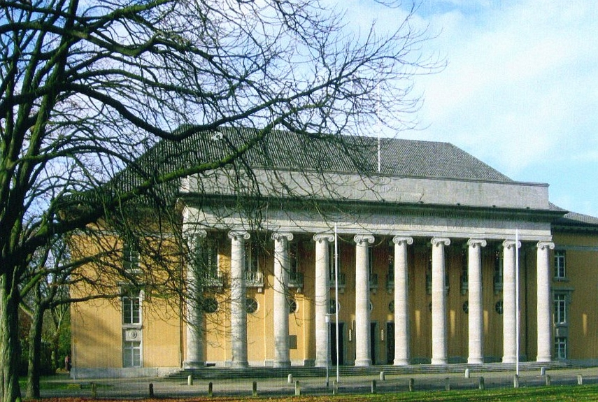 Landtagsgebäude